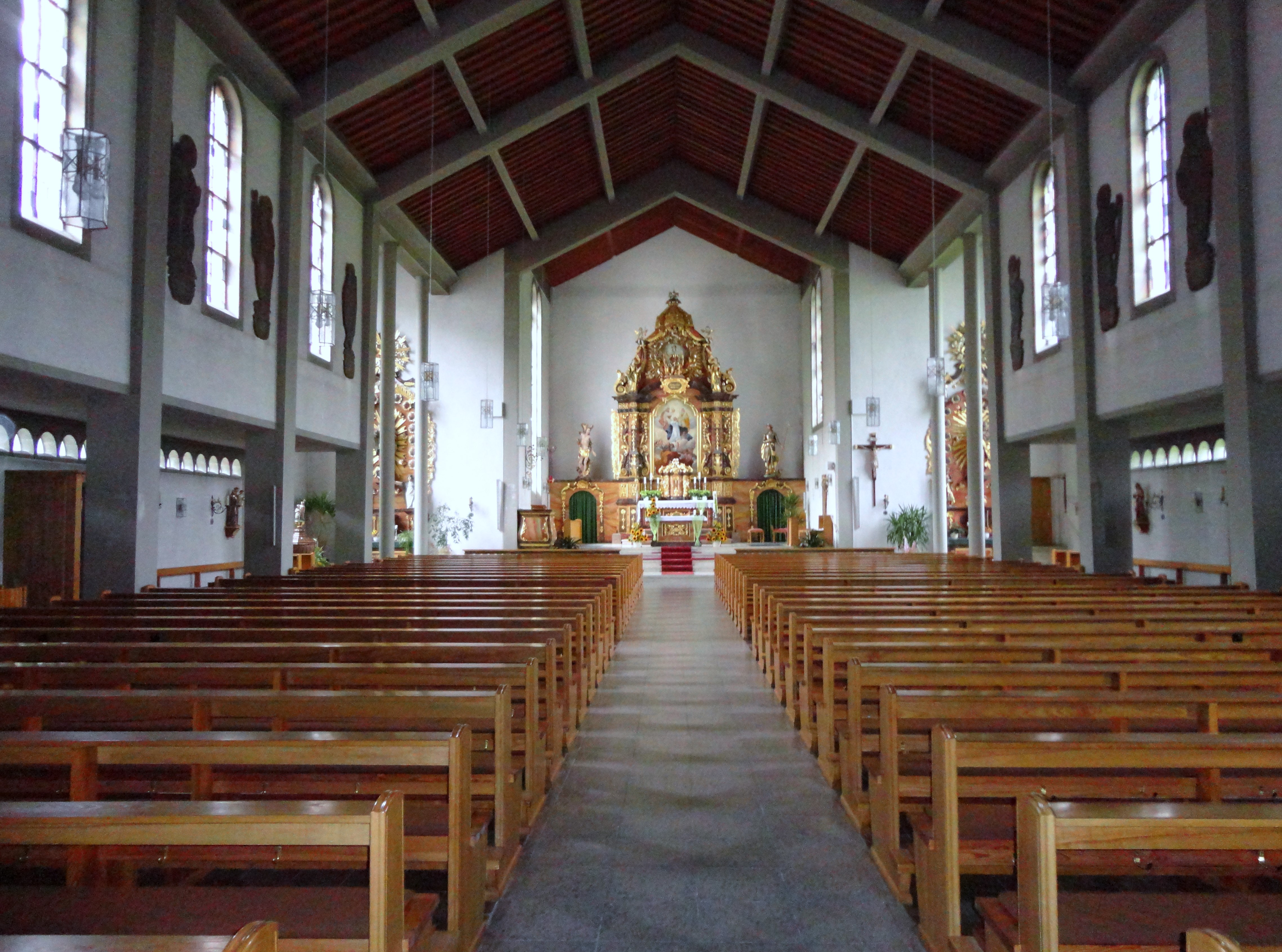 Innenansicht der katholischen Kirche St. Afra in Mühlenbach (Schwarzwald)